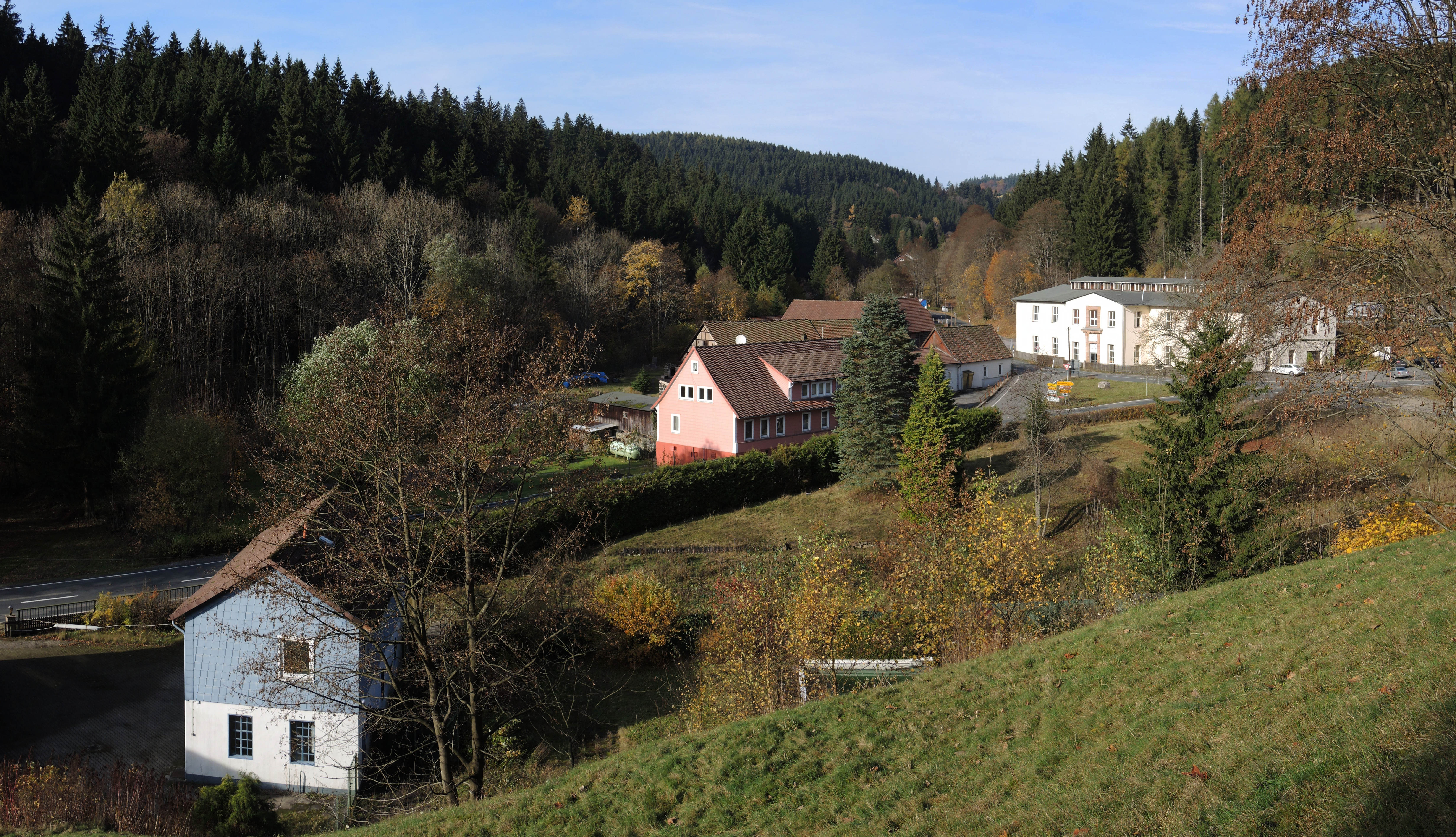 Südaufnahme von Silberhütte, aufgenommen vom Nordwesthang des Hüttenkopfes